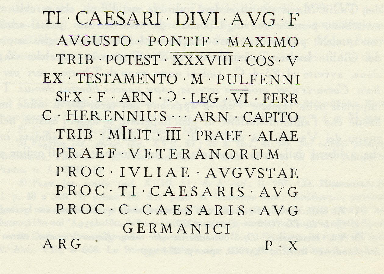 (centurionis) leg(ionis) VI Ferr(atae) / C(aius) Herennius [3] Arn(ensi) Capito / trib(unus) milit(um) III praef(ectus) alae / praef(ectus) veteranorum / proc(urator) Iuliae Augustae / proc(urator) Ti(beri) Caesaris Aug(usti) / proc(urator) C(ai) Caesaris Aug(usti) / Germanici / arg(enti) p(ondo) X